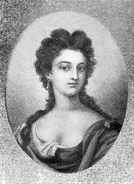 Henriette von Osterhausen, spätere Frau von Stanislawsky